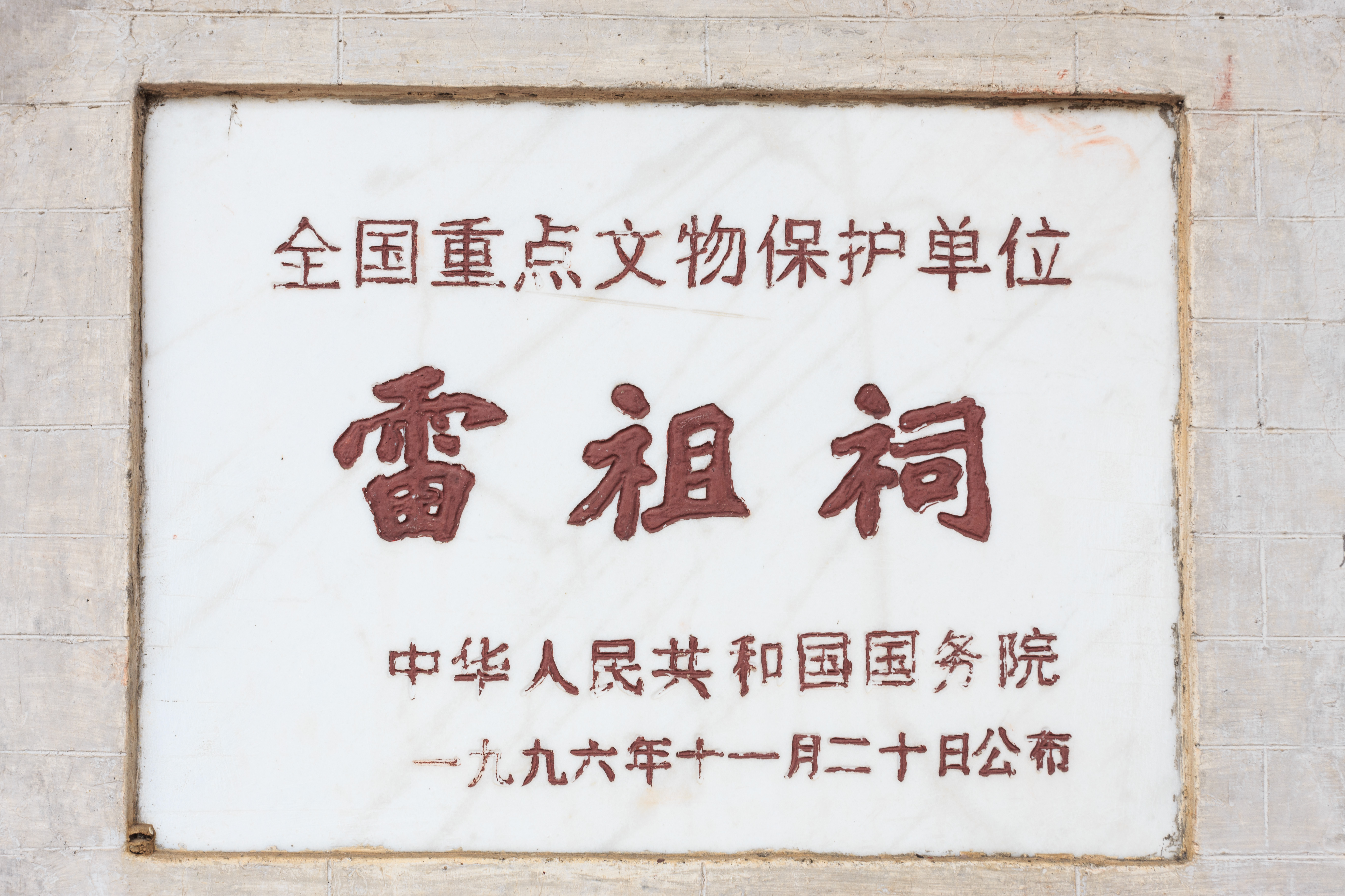 雷州雷祖祠